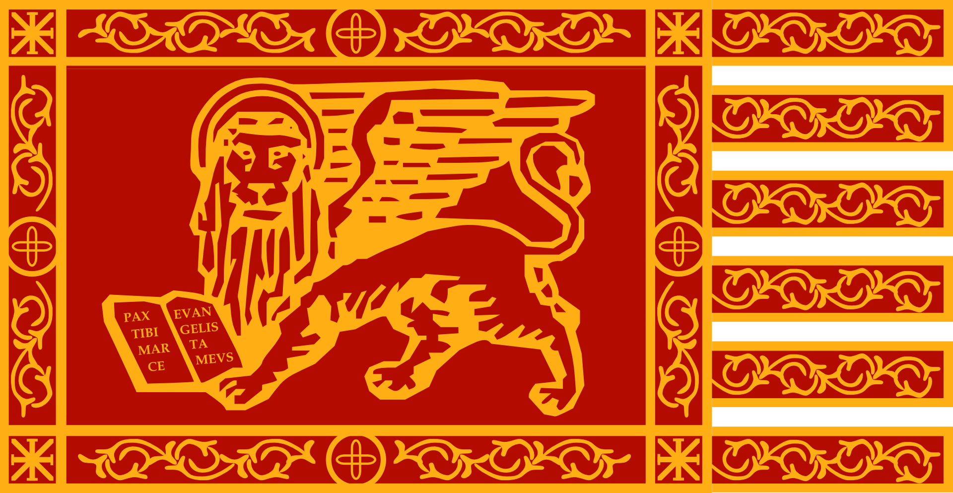 Bandiera della Serenissima Repubblica di Venezia, versione con leone che si appoggia su tre zampe e tiene il libro con la quarta